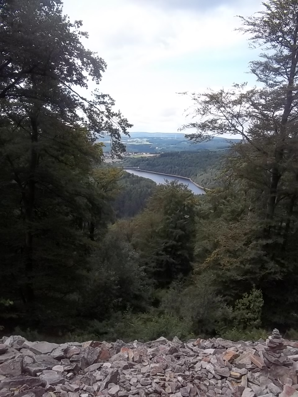 Vue depuis le sommet du mur sud